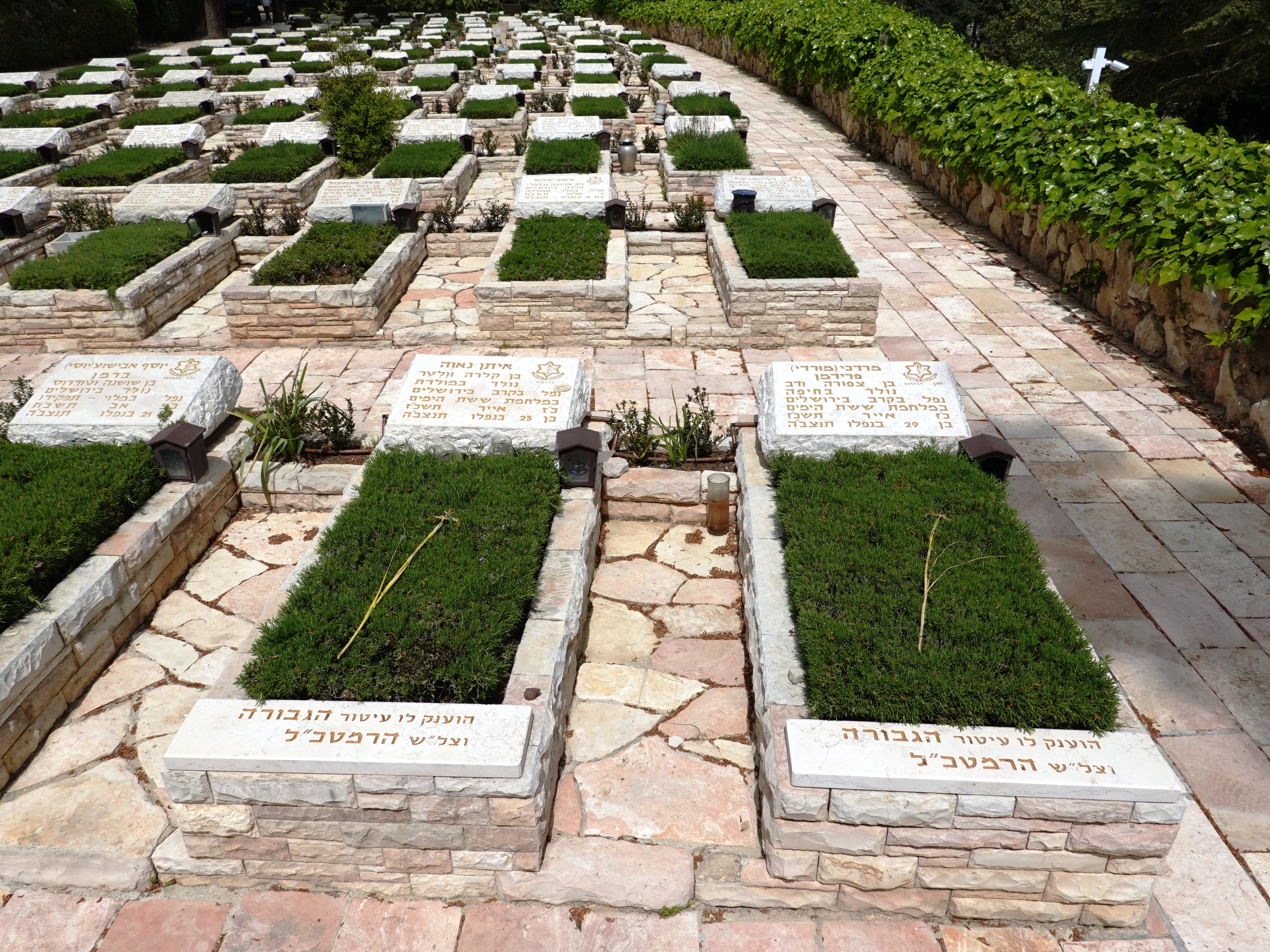 קברי מרדכי פרידמן ואיתן נאוה בחלקת חללי מלחמת ששת הימים בהר הרצל